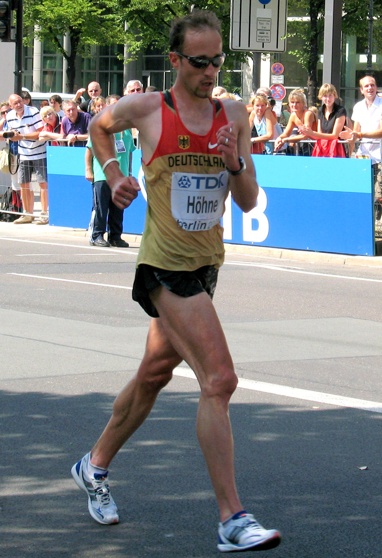 André Höhne, 15.08.2009